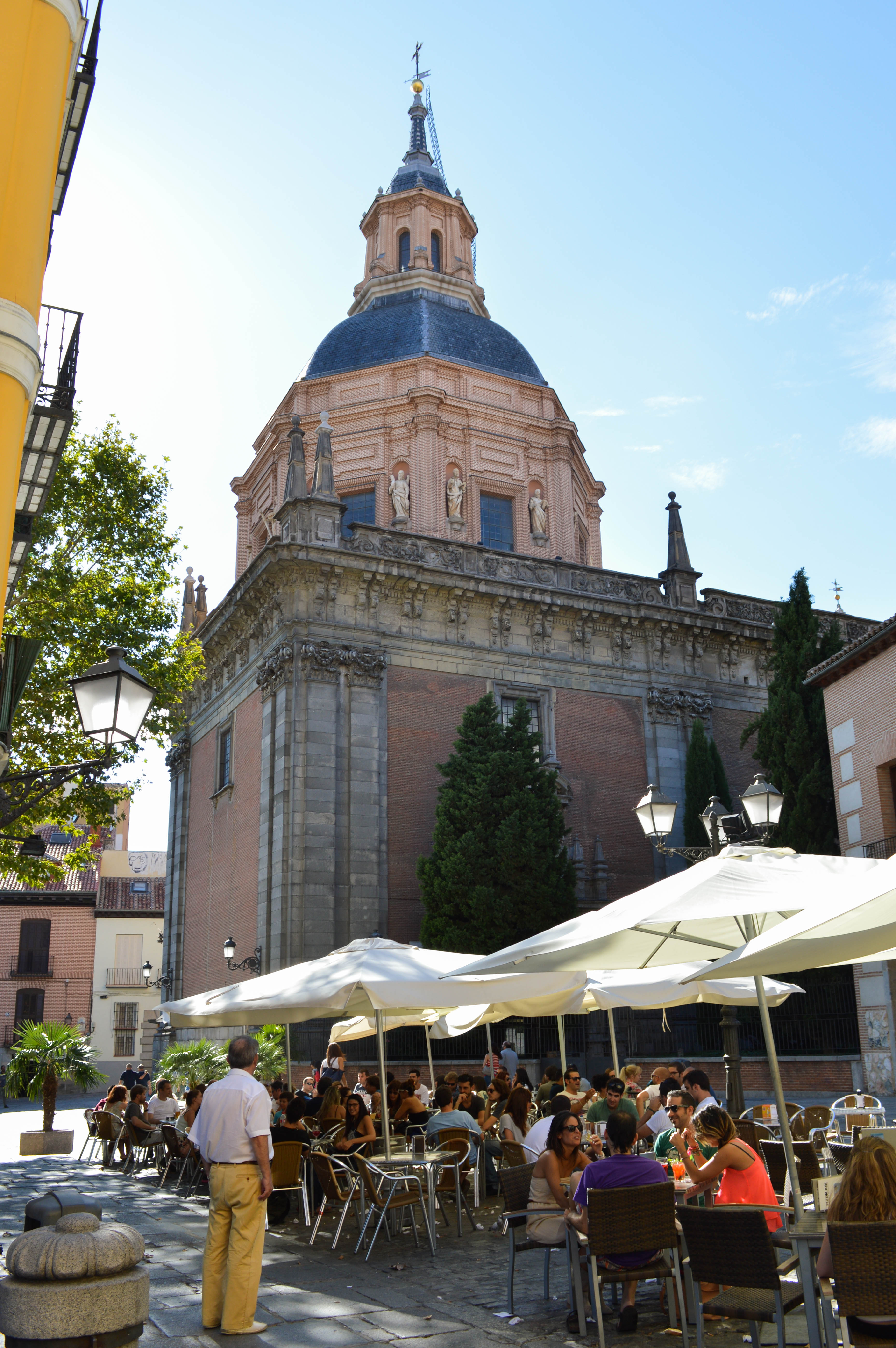 Plaza de los Carros